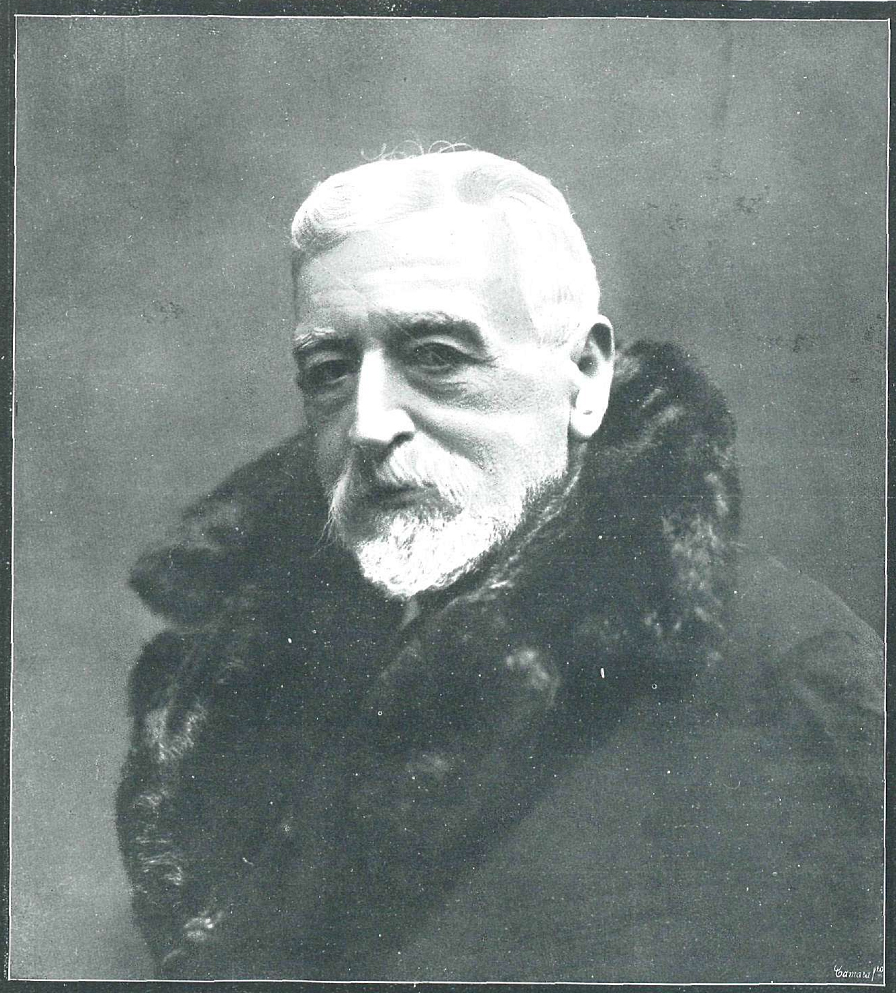 Retrato de Eugenio Montero Ríos, obra del fotógrafo Kaulak, recogido en la revista española La Esfera.